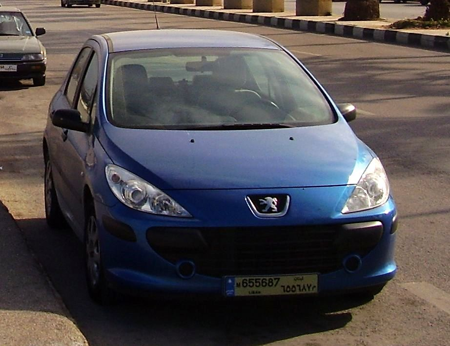 Véhicule Peugeot bleu immatriculé au Liban à Mkallès